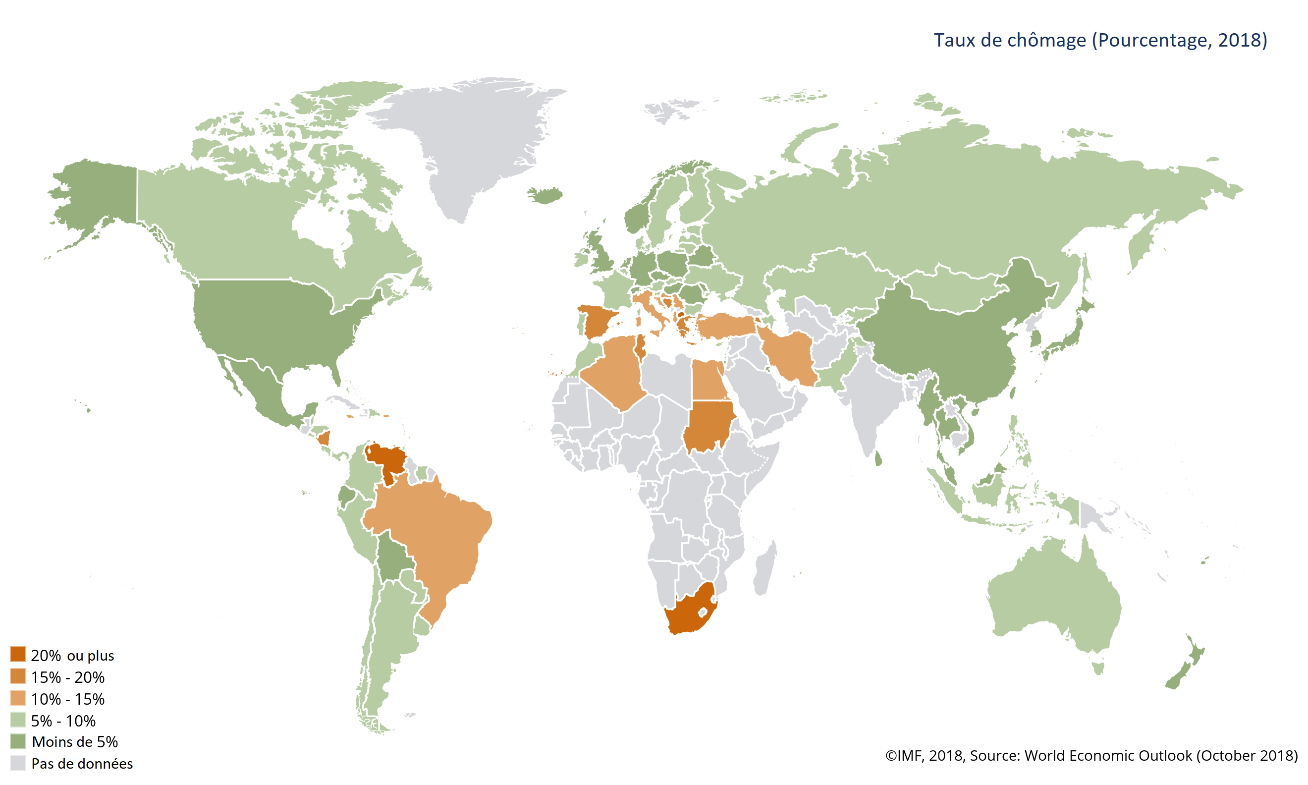 Carte du chômage mondial en Octobre 2018 selon les données fournies par le Fonds Monétaire International.